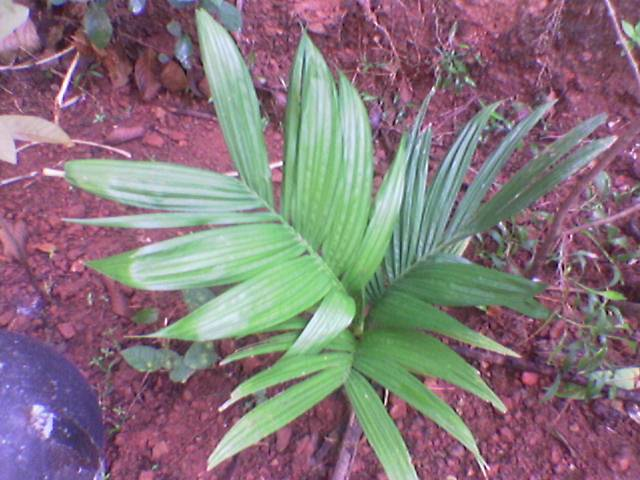 അടക്കമരതിന്റെ കുറിയ ഇനം.. Taken by Nokia 6600